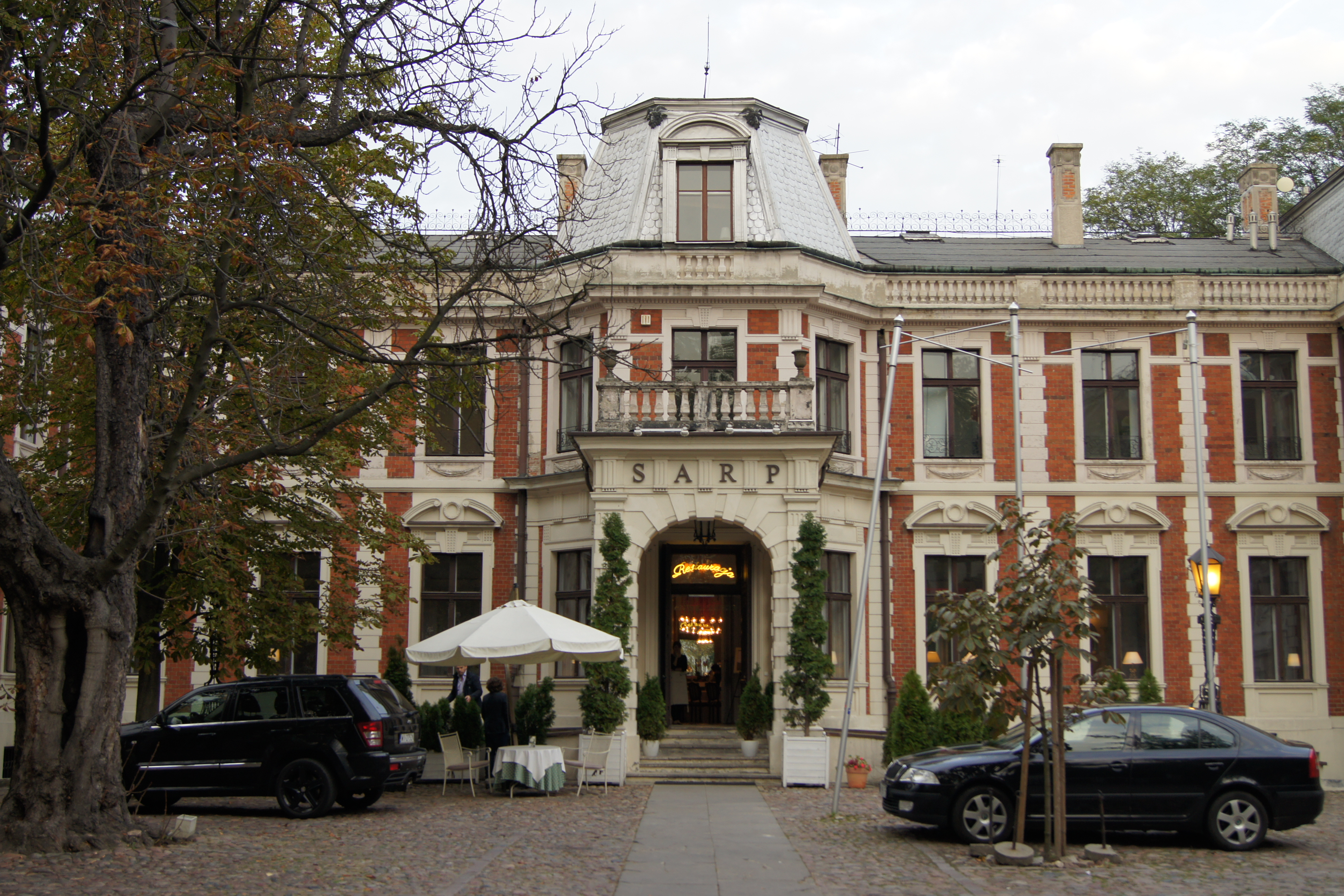 zespół pałacu Zamoyskich, ul. Foksal 1/2/4, Warszawa, dz. Śródmieście, widok od frontu, zdj.2